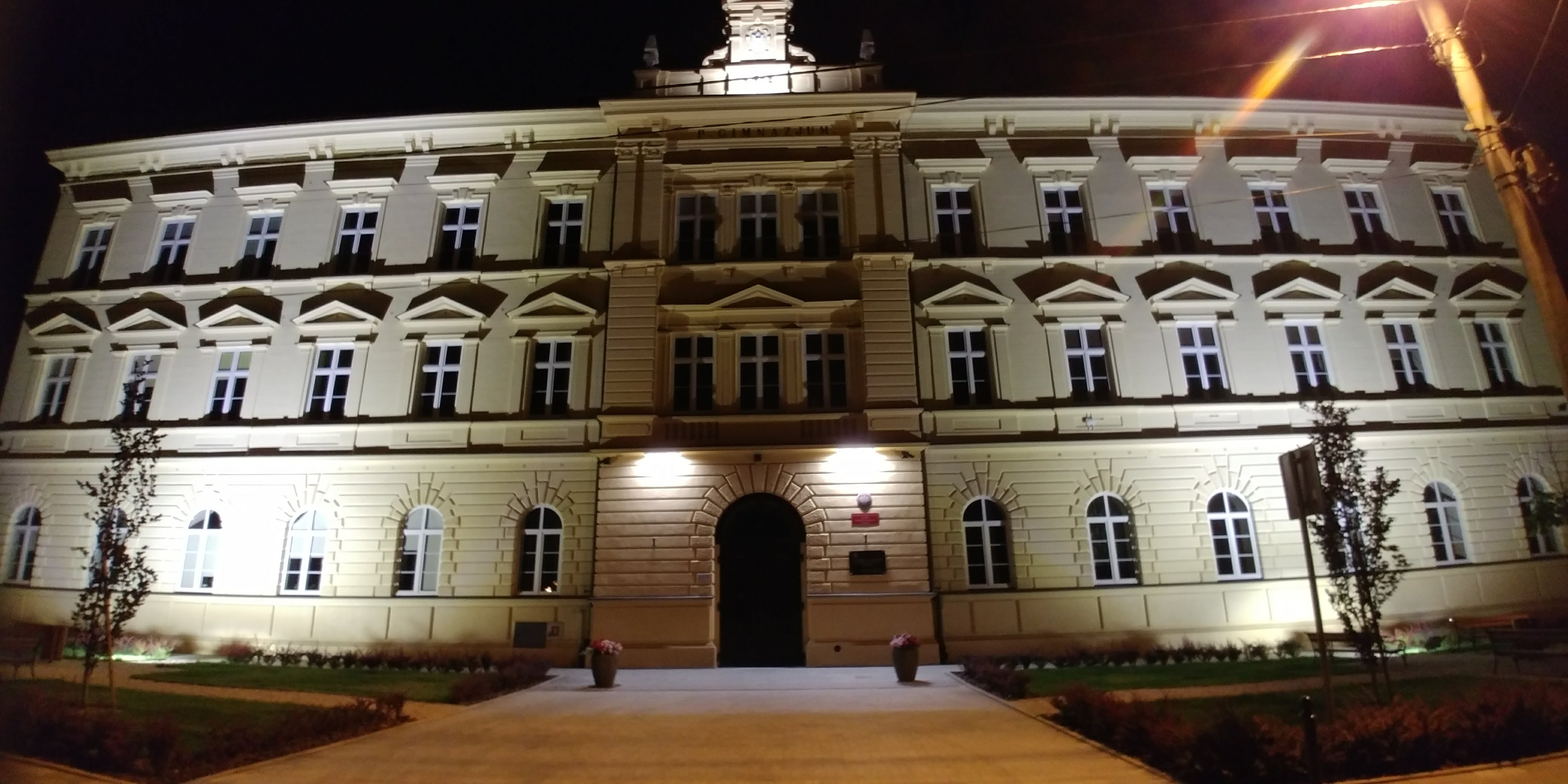 Budynek I Liceum Ogólnokształcącego w Bochni.